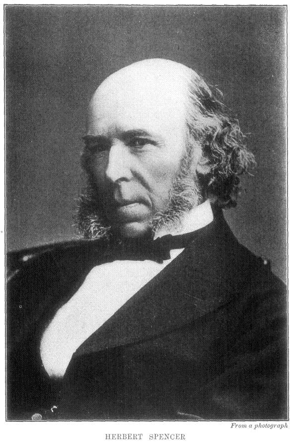 Bild wurde vor 1903 aufgenommen, daher sehr wahrscheinlich PD